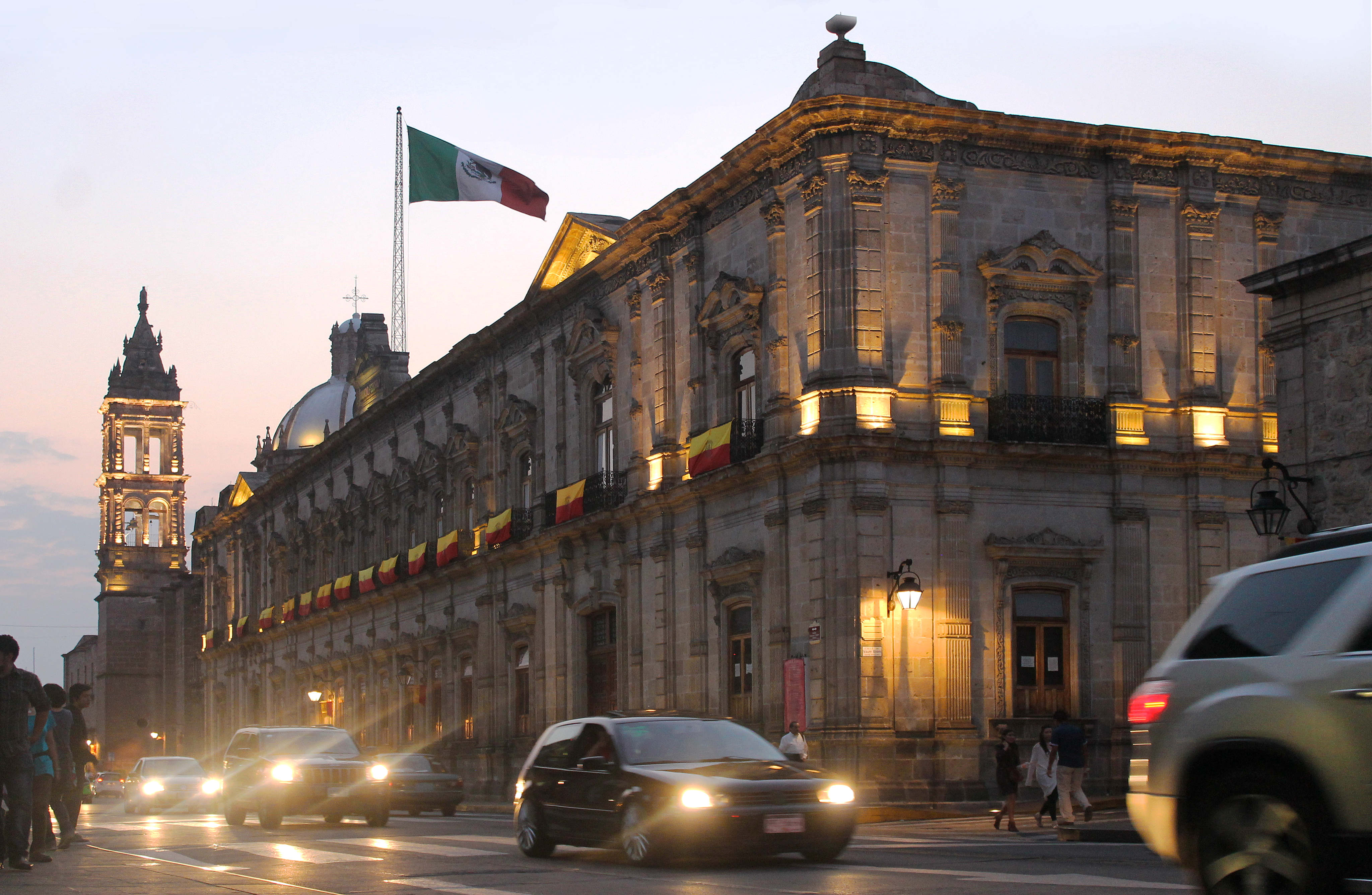 Palacio Federal de Morelia, hoy edificio de Correos de México